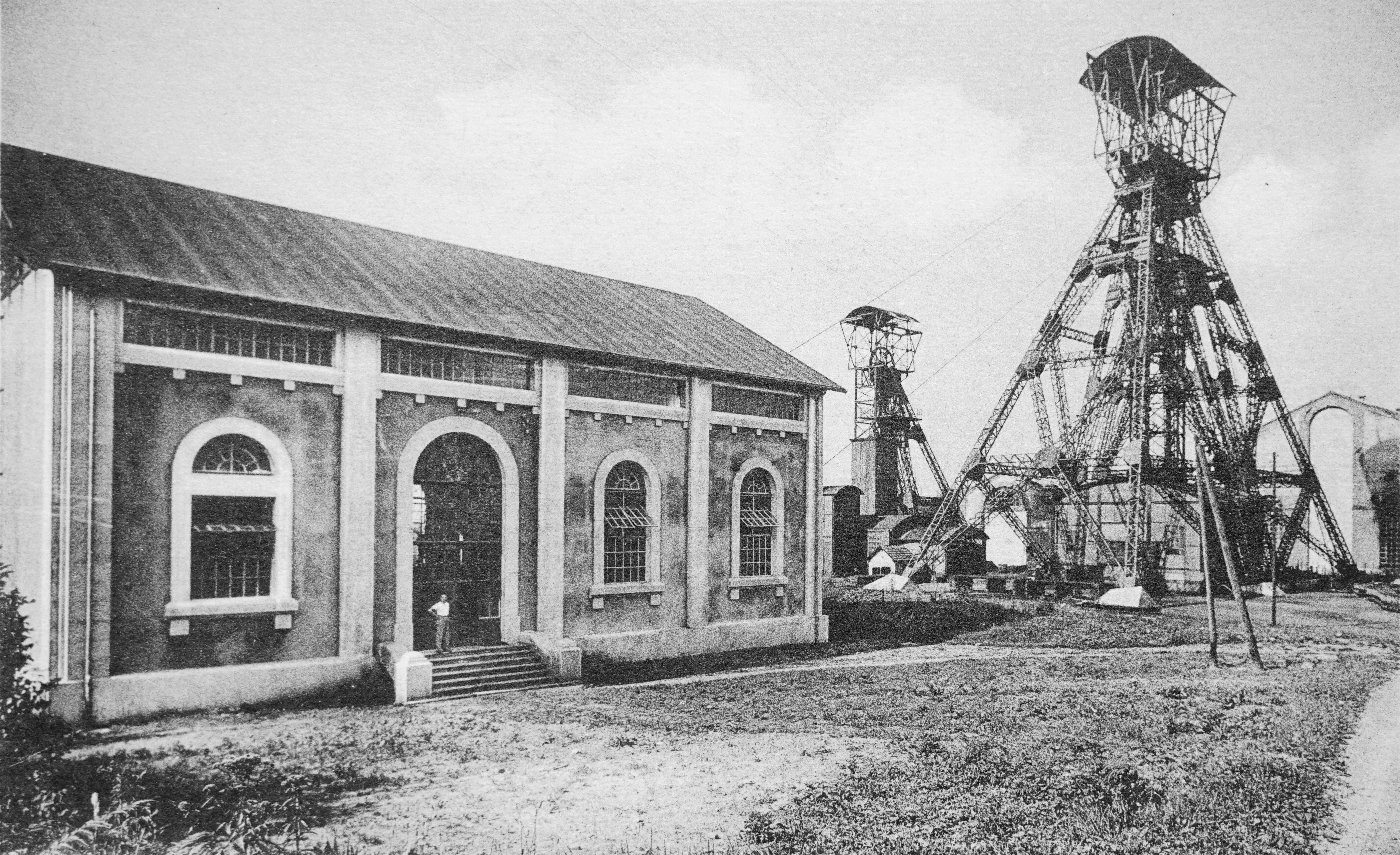 Le puits Arthur-de-Buyer après 1928 avec le nouveau bâtiment d'extraction (machine électrique) et le chevalement double.